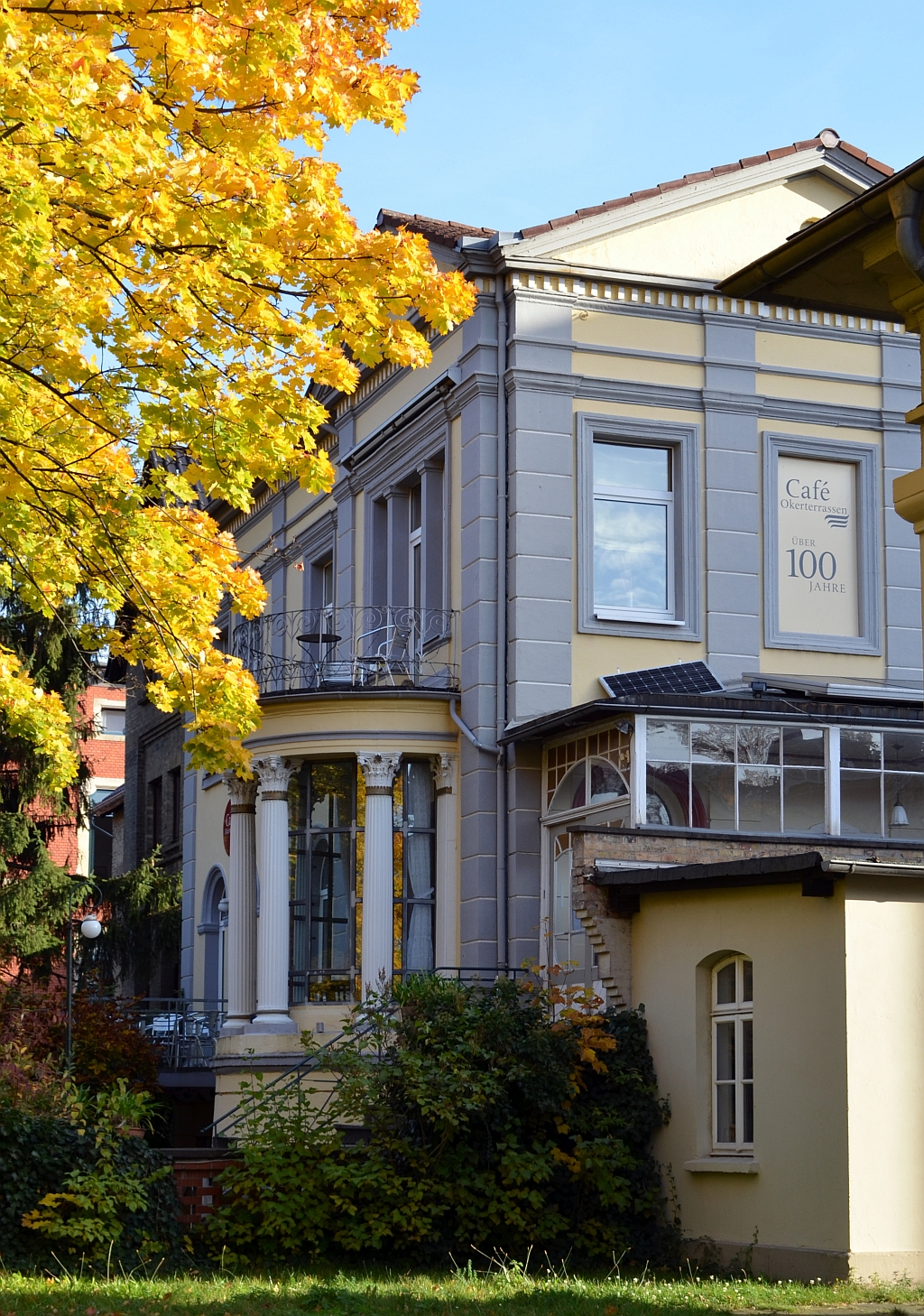 Braunschweig, Parkstraße 11, Café Okerterrassen: Ansicht von Südwesten.